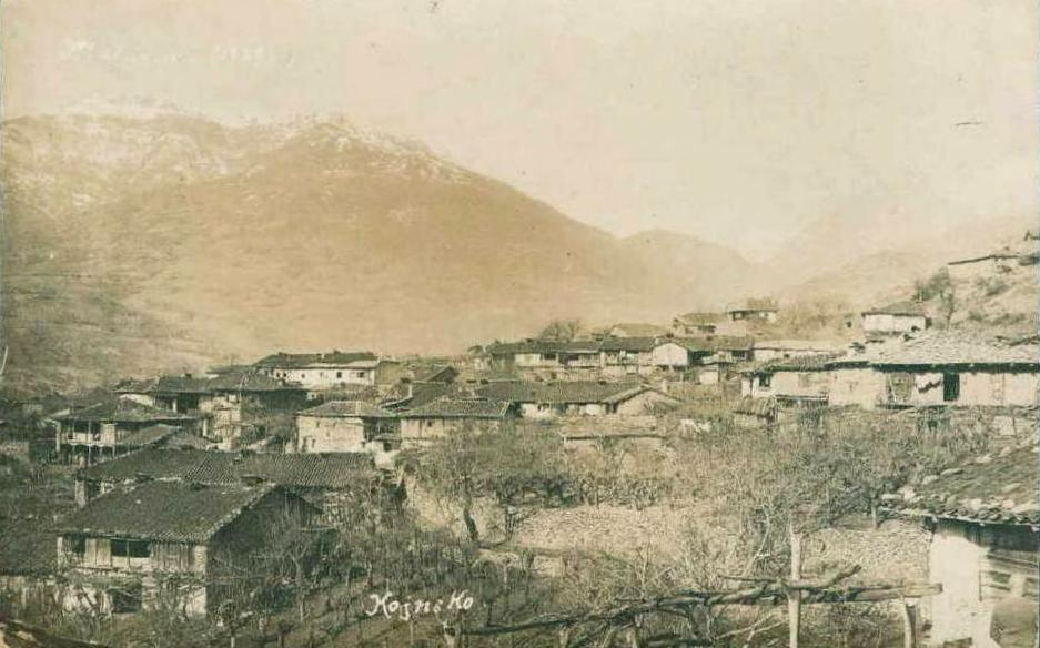 Конско под връх Мала Рупа през Първата световна война